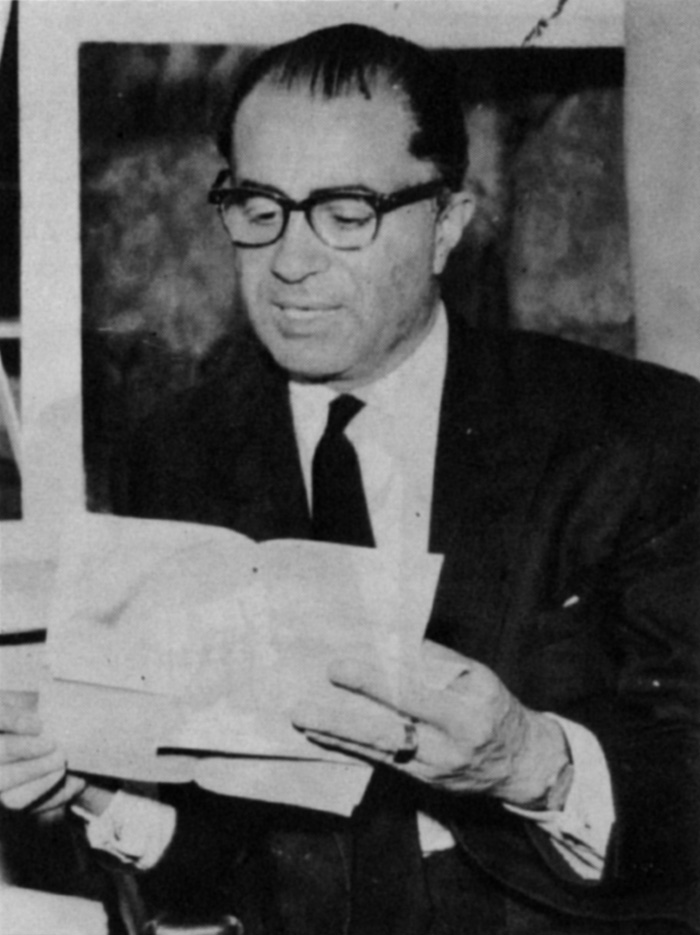 محسن فروغی در دهه 1330